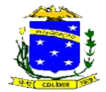 Brasão_Colíder_MT.gif